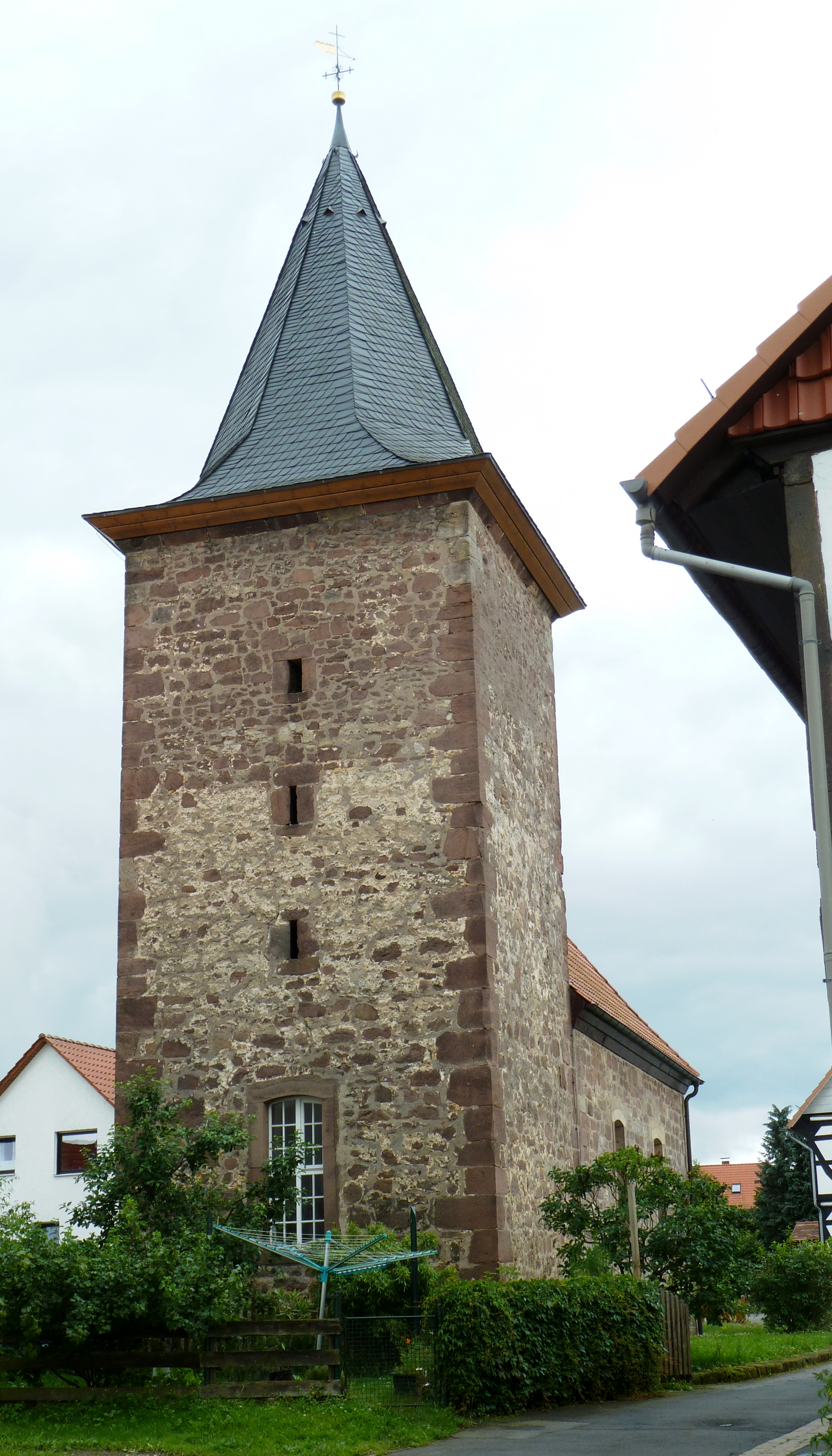 Ev.-luth. Kirche in Mollenfelde, Gemeinde Friedland, Südniedersachsen. Ostturm in Bruchstein mit Eckquaderung und schmalen Fensterschlitzen mittelalterlich, Schiff Mitte 18. Jahrhundert in Turmbreite angebaut.